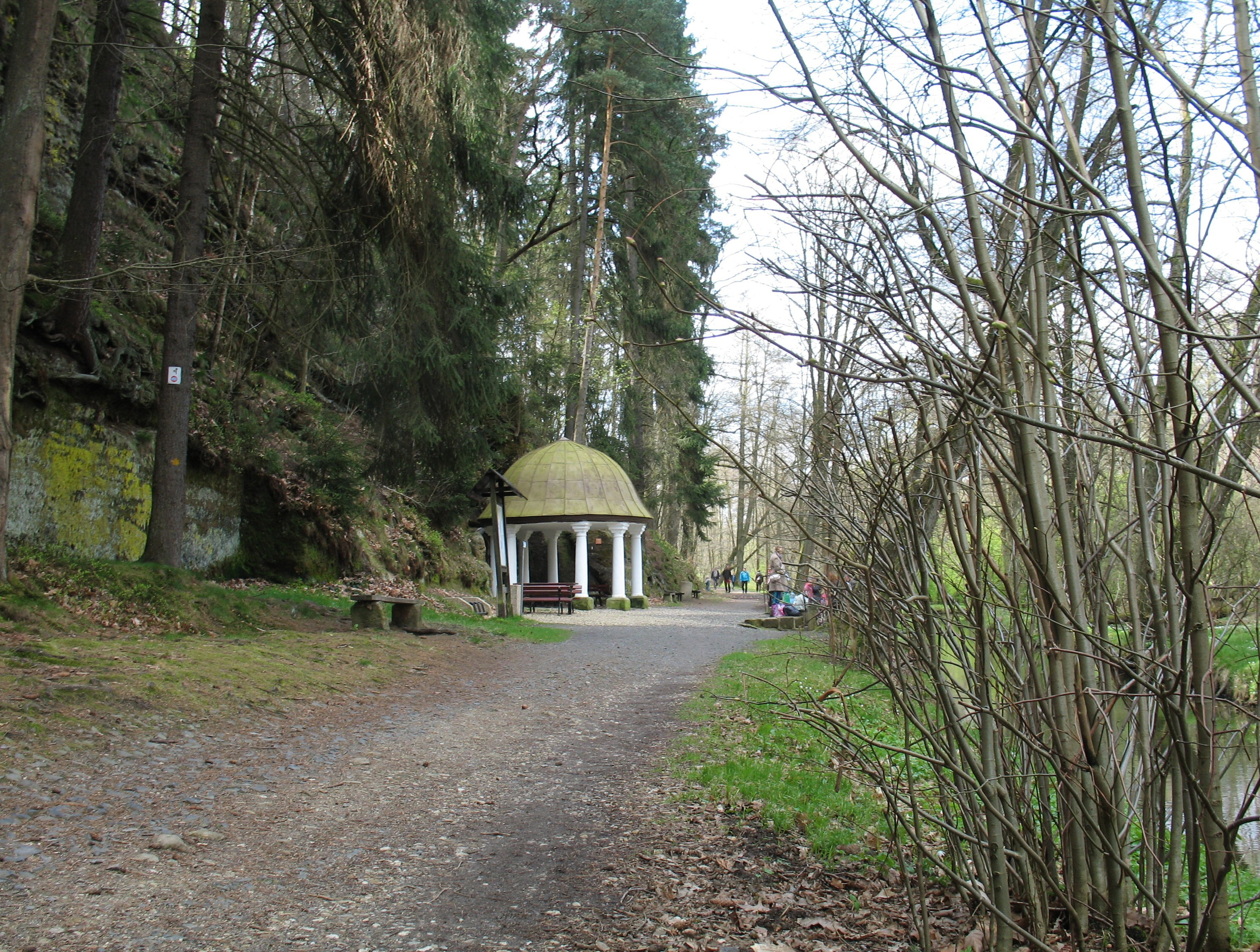 U studánky